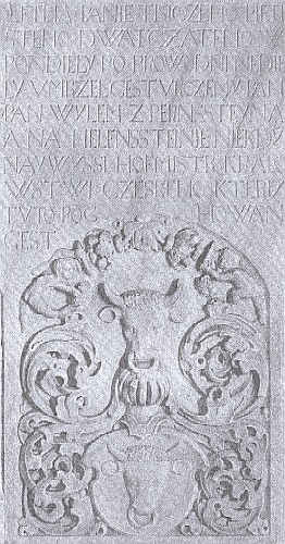 Nahrobek Viléma II. z Pernštejna